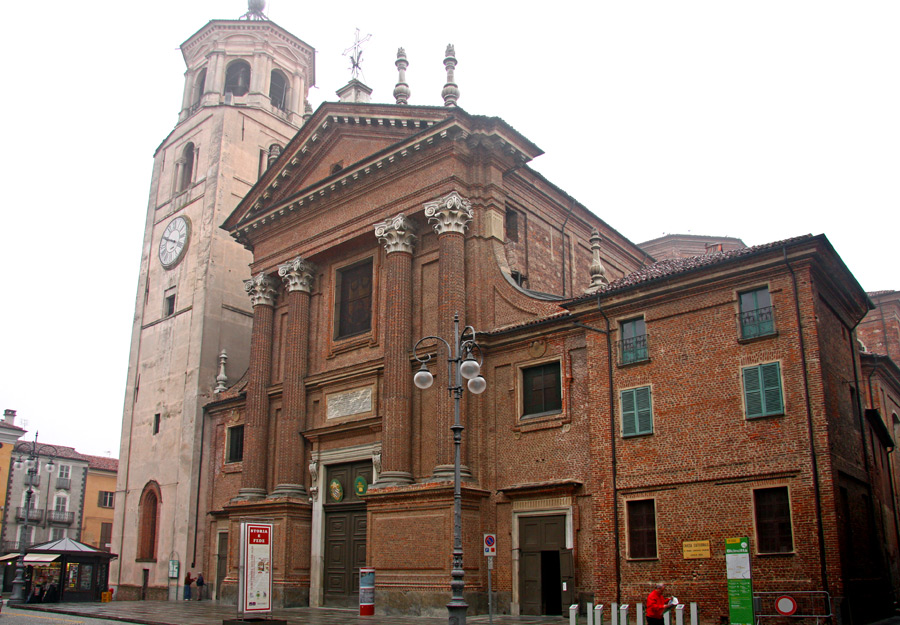 Cattedrale di Santa Maria e San Giovenale, Duomo di Fossano (CN)